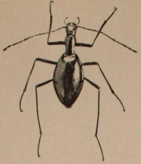 Photographie de Astagobius angustatus femelle ×3